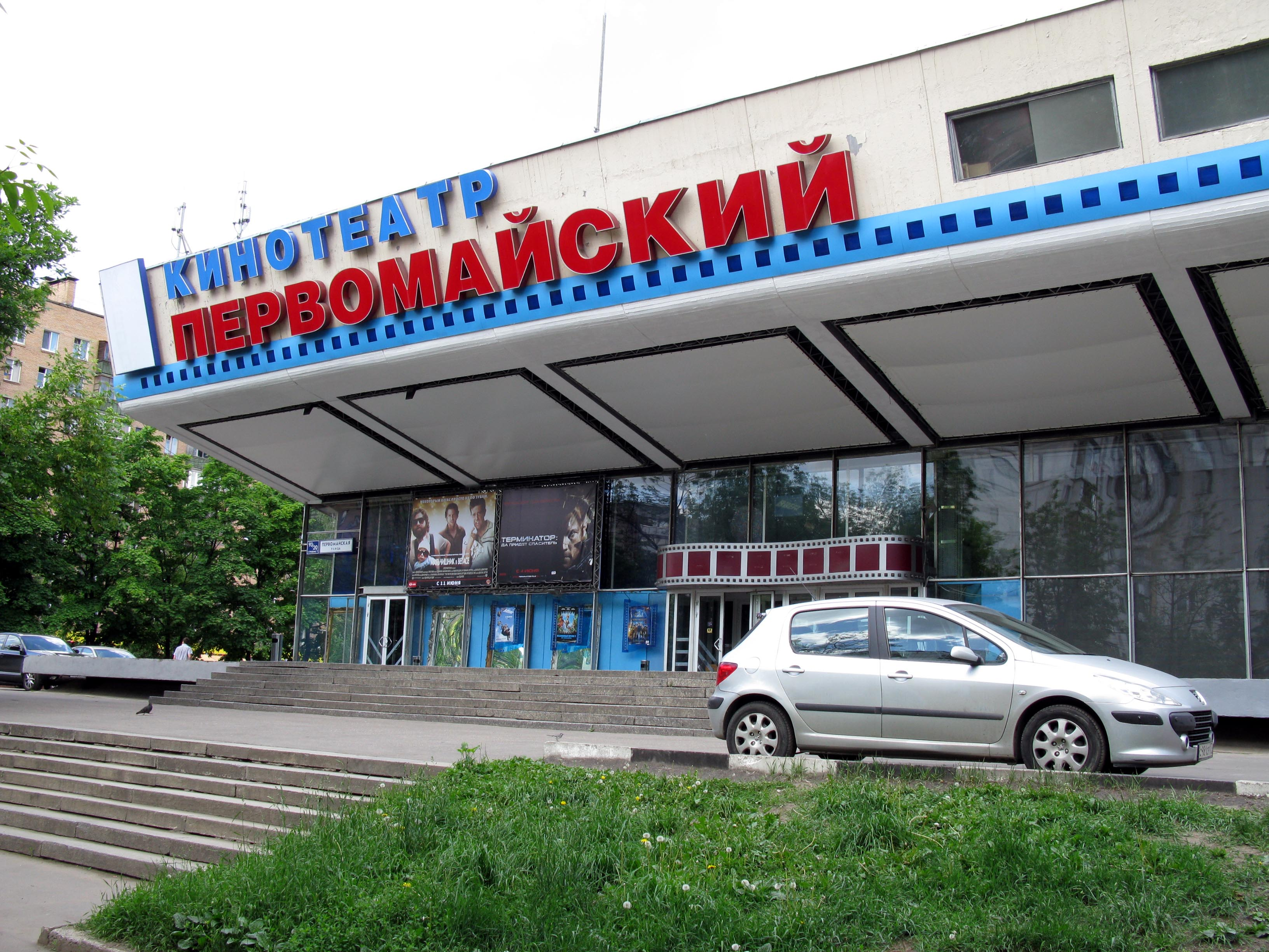 Кинотеатр «Первомайский» (г.Москва, Первомайская улица, 93/20.)